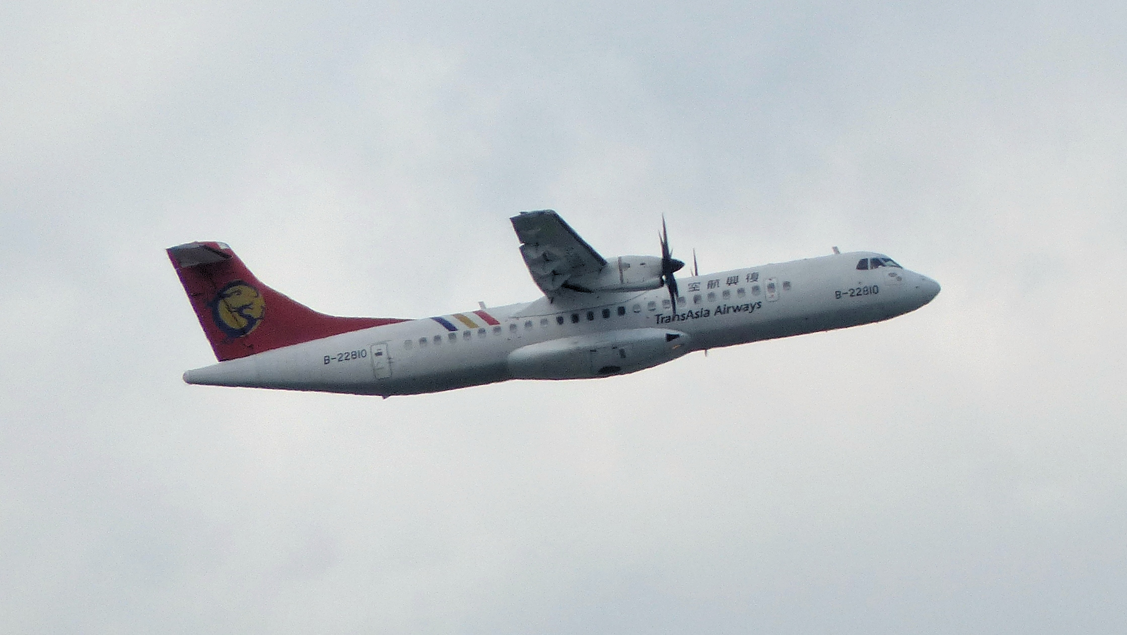 臺北松山機場起飛爬升的復興航空ATR 72-500 B-22810。